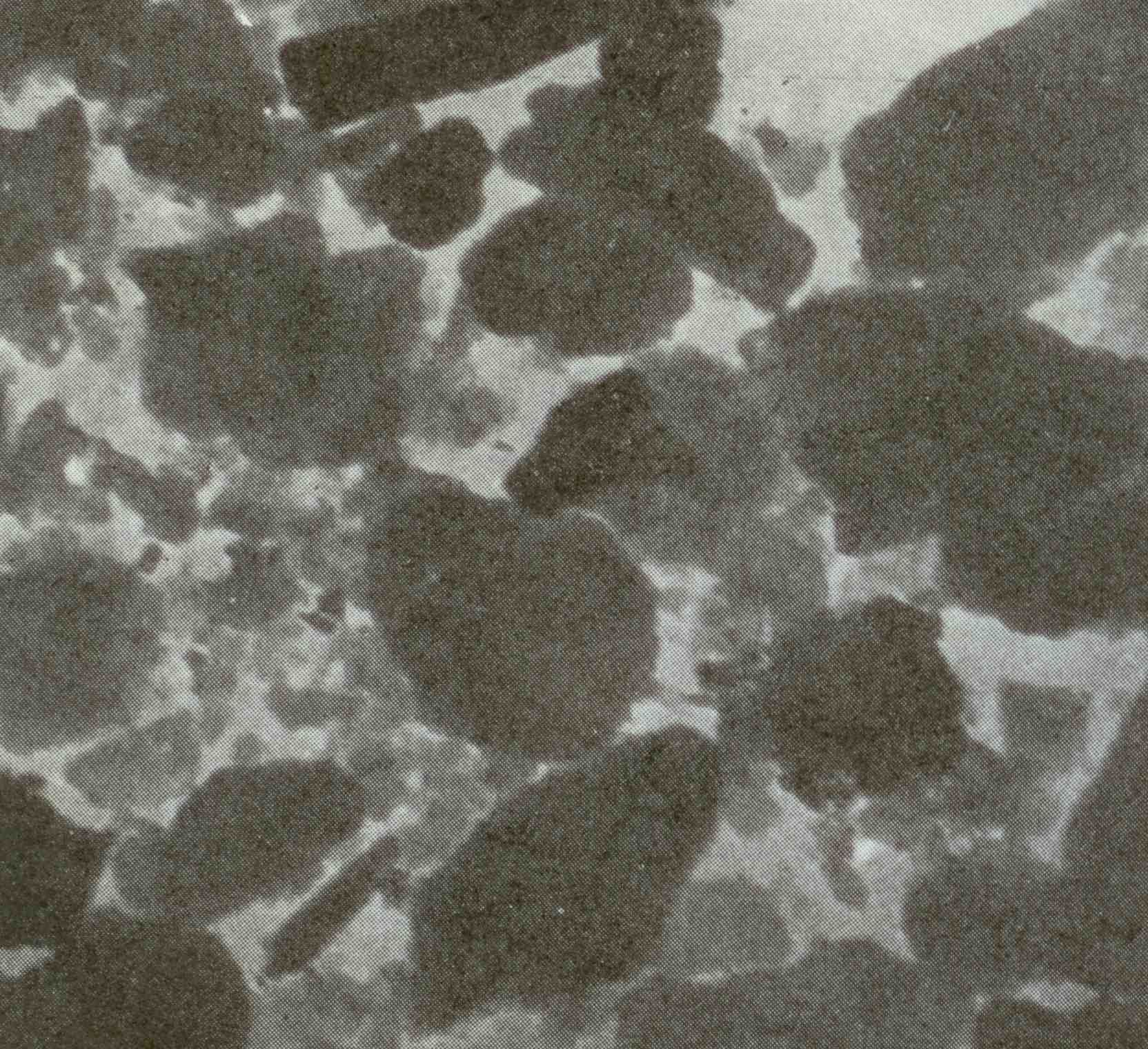 Fotografía del artículo de Luis García Sáinz de 1964 Las dos clases de hielos y arcillas cuaternarias del Pirineo debidas a sus dos fases climáticas mostrando una prueba electrónica al microscopio